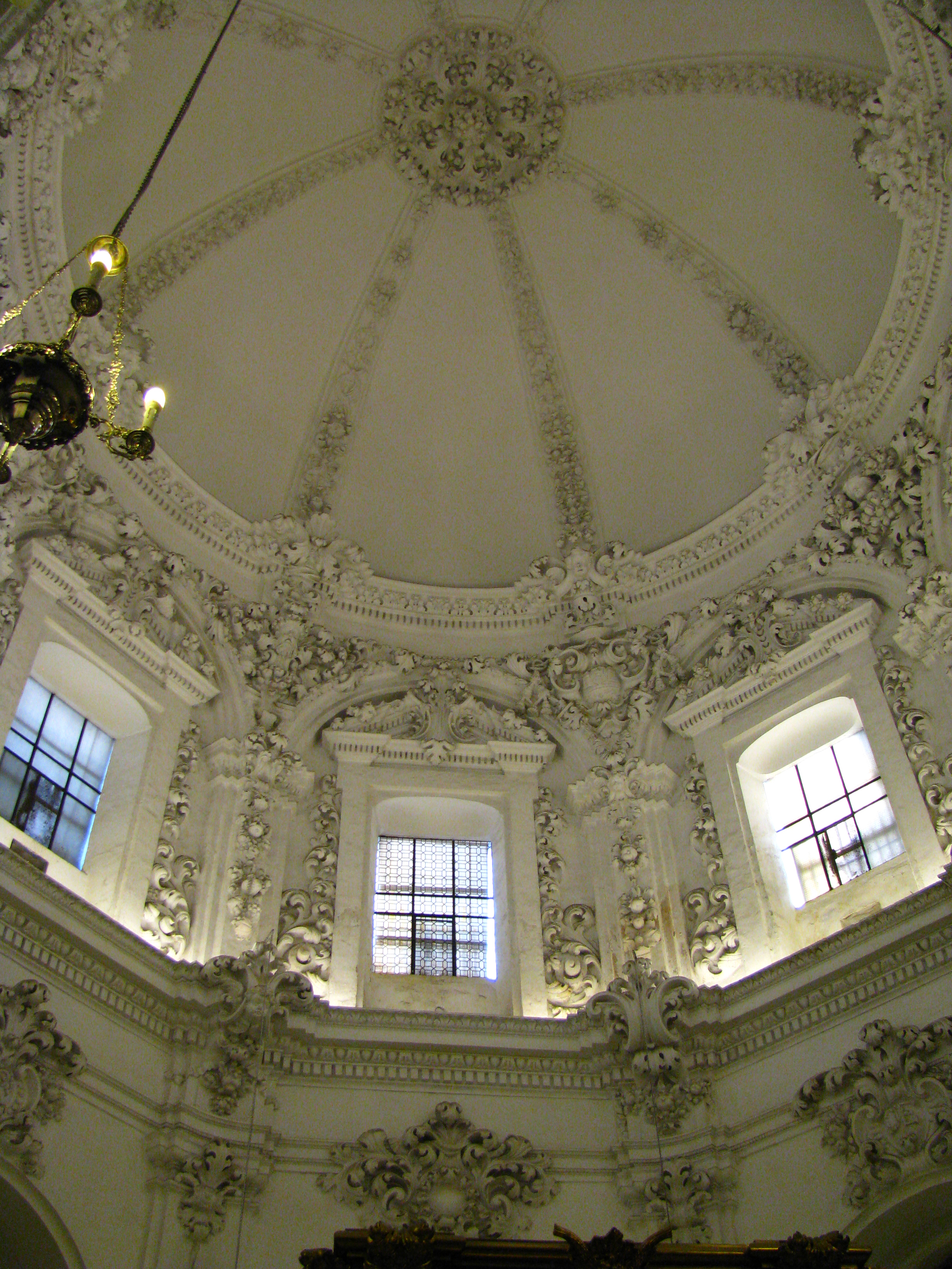 Capilla de Santa Teresa de la Mezquita de Córdoba, Córdoba (España).